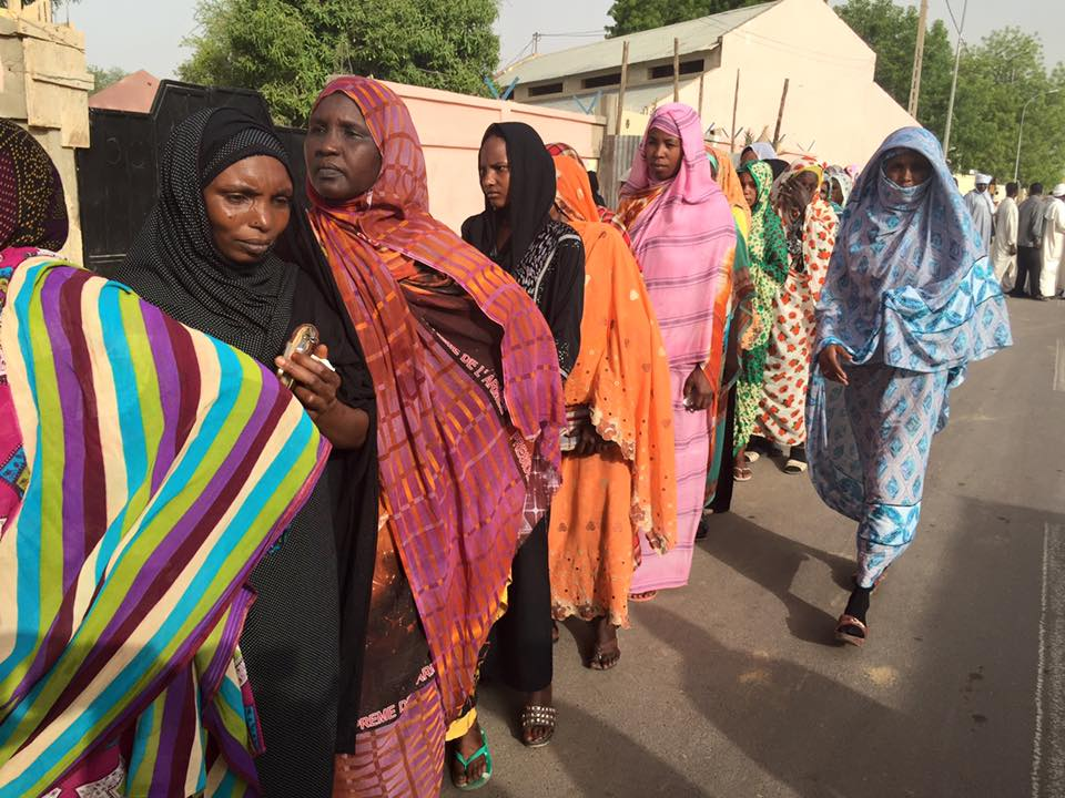 Longues files d'attente devant les bureaux de vote, parfois jusque dans la rue, ici à N'Djamena, Tchad, 10 avril 2016.